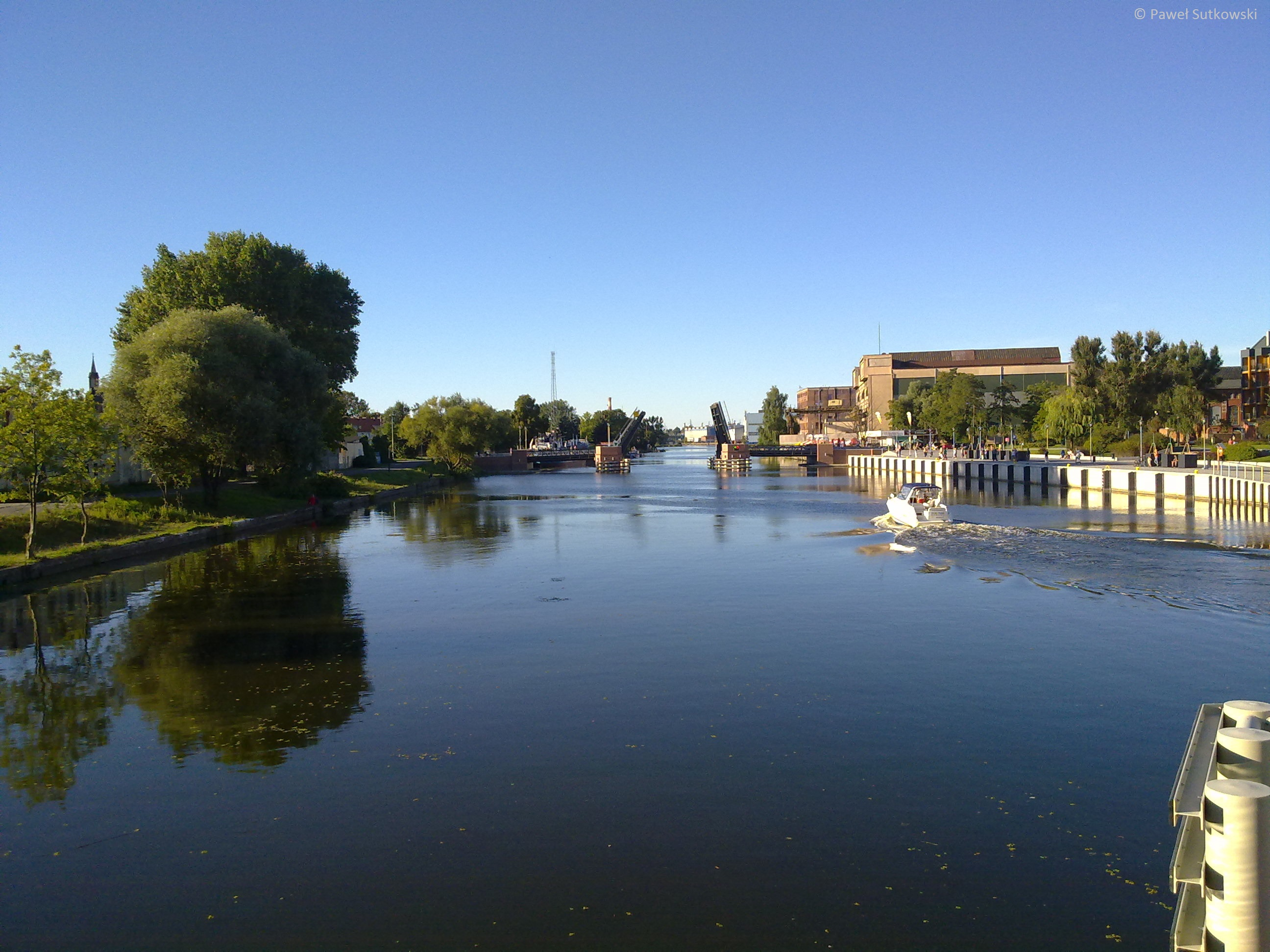 Jeden z mostów zwodzonych w Elblągu.